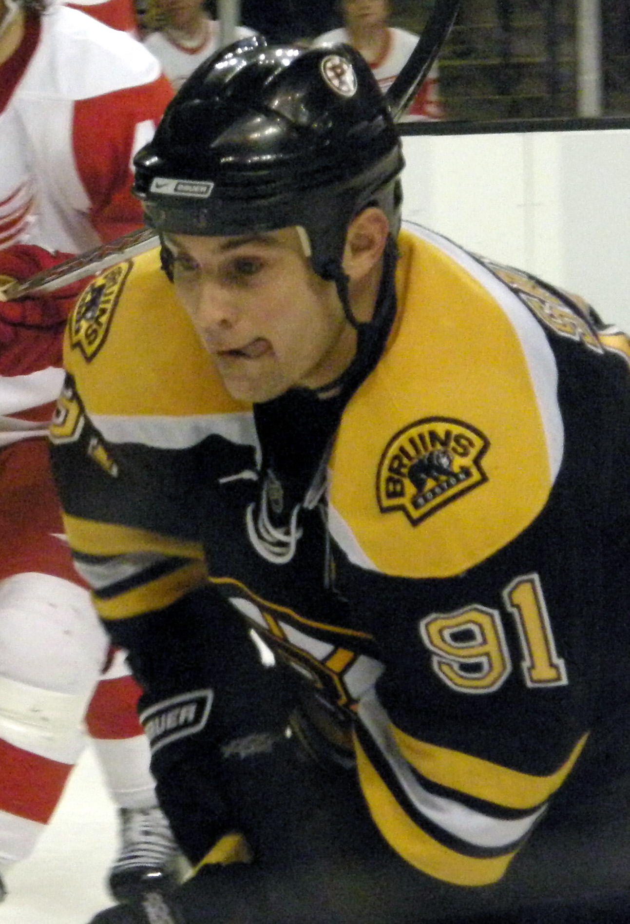 91 Marc Savard (C)